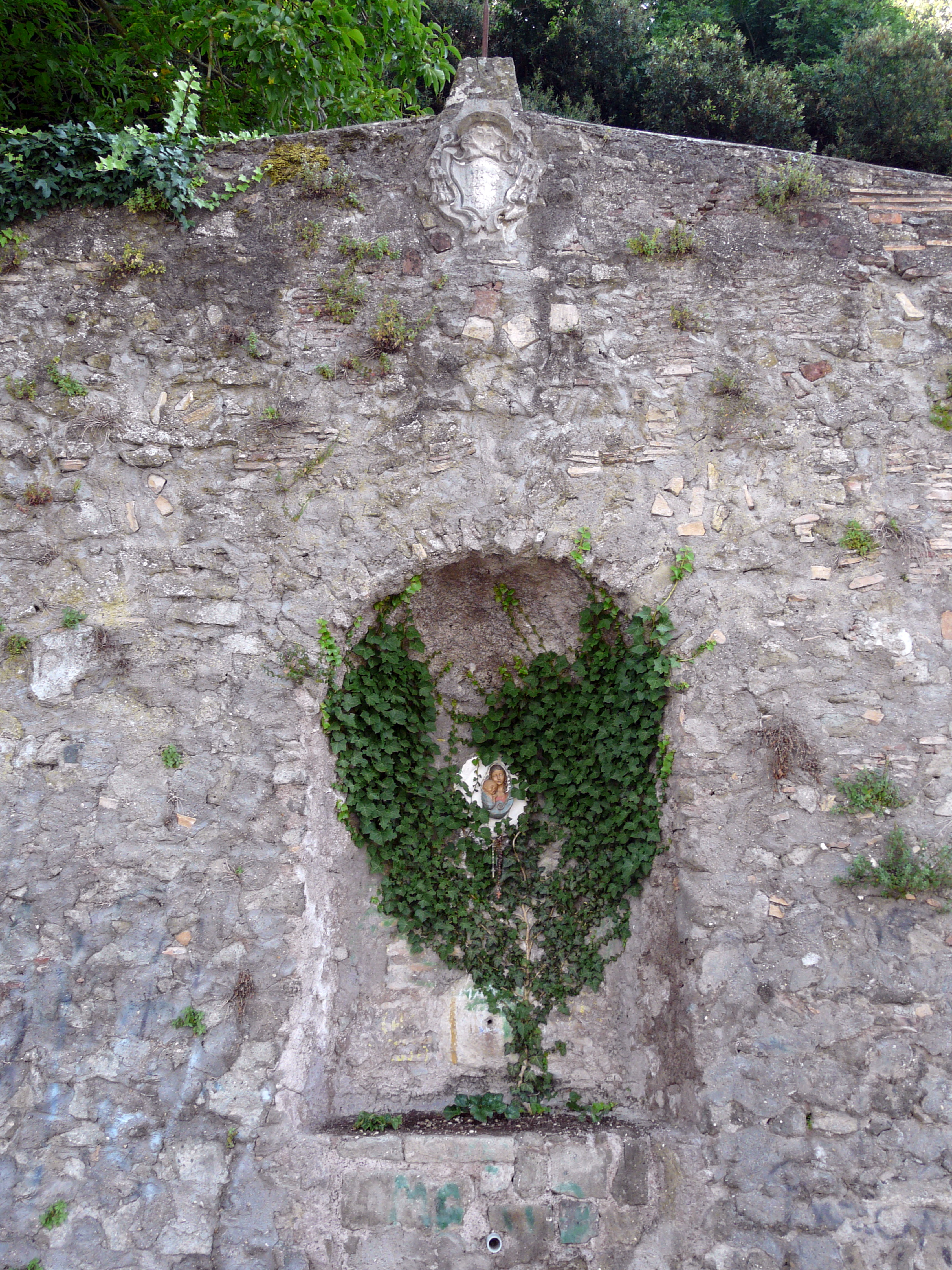 Edicola con Madonnina, Palazzolo (Rocca di Papa)